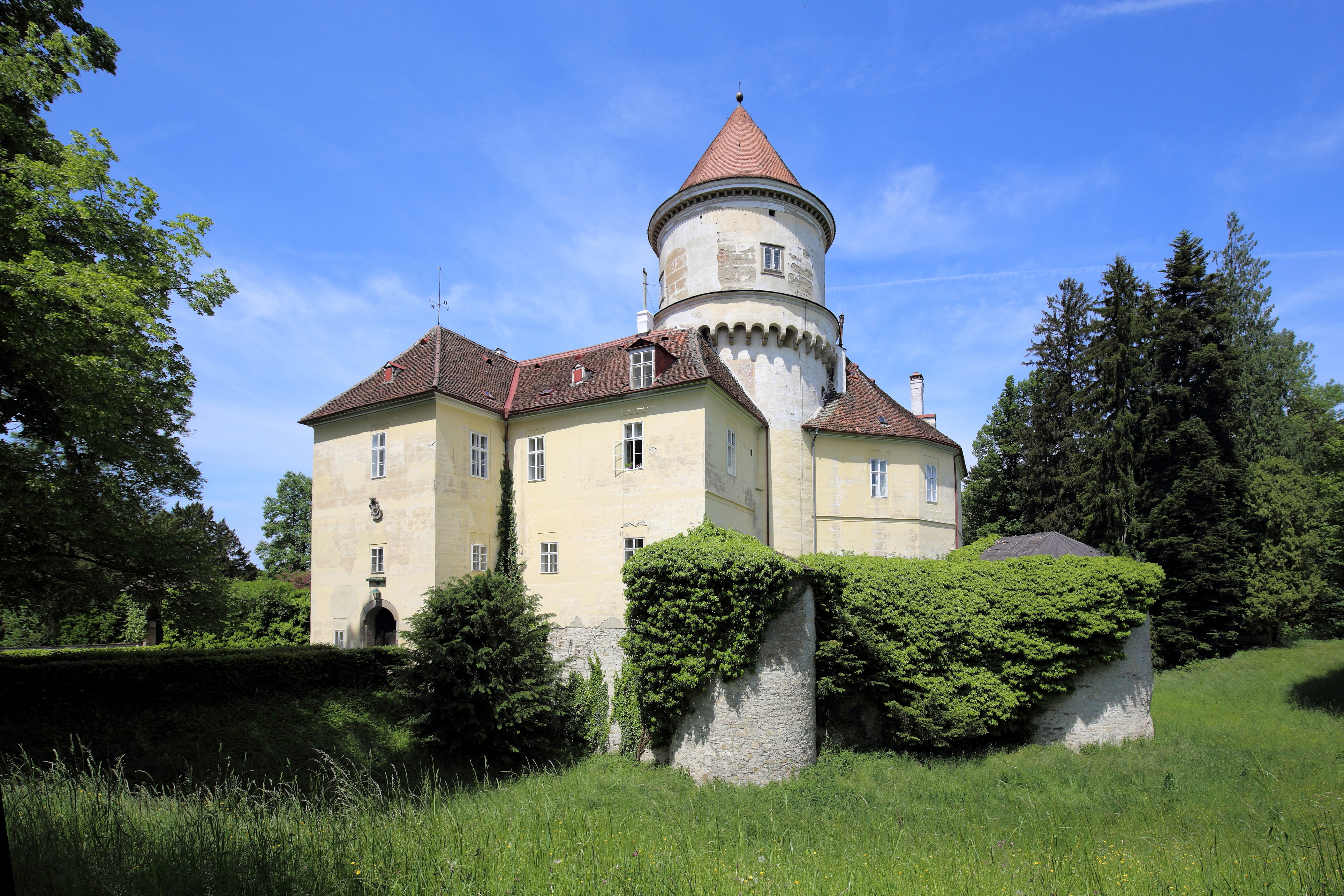 Südostansicht des Schlosses Wald in der niederösterreichischen Marktgemeinde Pyhra. Eine mittelalterliche Burg, die in der zweiten Hälfte des 16. und der ersten Hälfte des 17. Jahrhunderts zu einem Renaissance-Wasserschloss umgebaut wurde. Das "Altschloss" ist eine dreigeschoßige Anlage mit 4 Trakten in unregelmäßiger Anordnung, die im Südosten vom mittelalterlichen Bergfried überragt wird. Im 19. Jahrhundert wurde das Schloss mehrmals verändert und erweitert; unter anderem wurde im Westen das "Neuschloss" (ein Trakt) angebaut und der Burgfried (mit einer Mauerstärke von ca. 3m) um ein Geschoß erhöht sowie mit einem Kegeldach versehen.